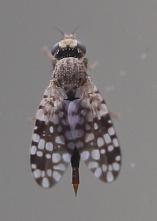 Bohrfliege Tephritis praecox am 9. Juni 2020